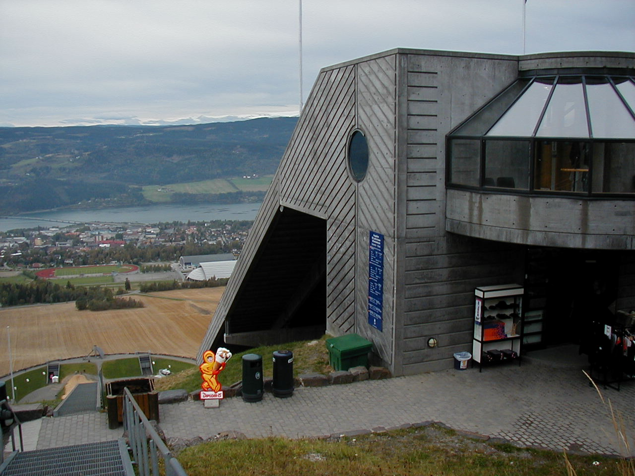 Lillehammer ski jump top